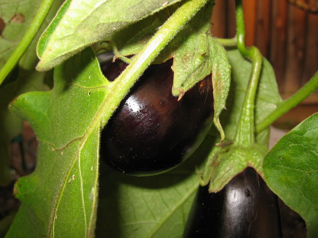 Eggplant